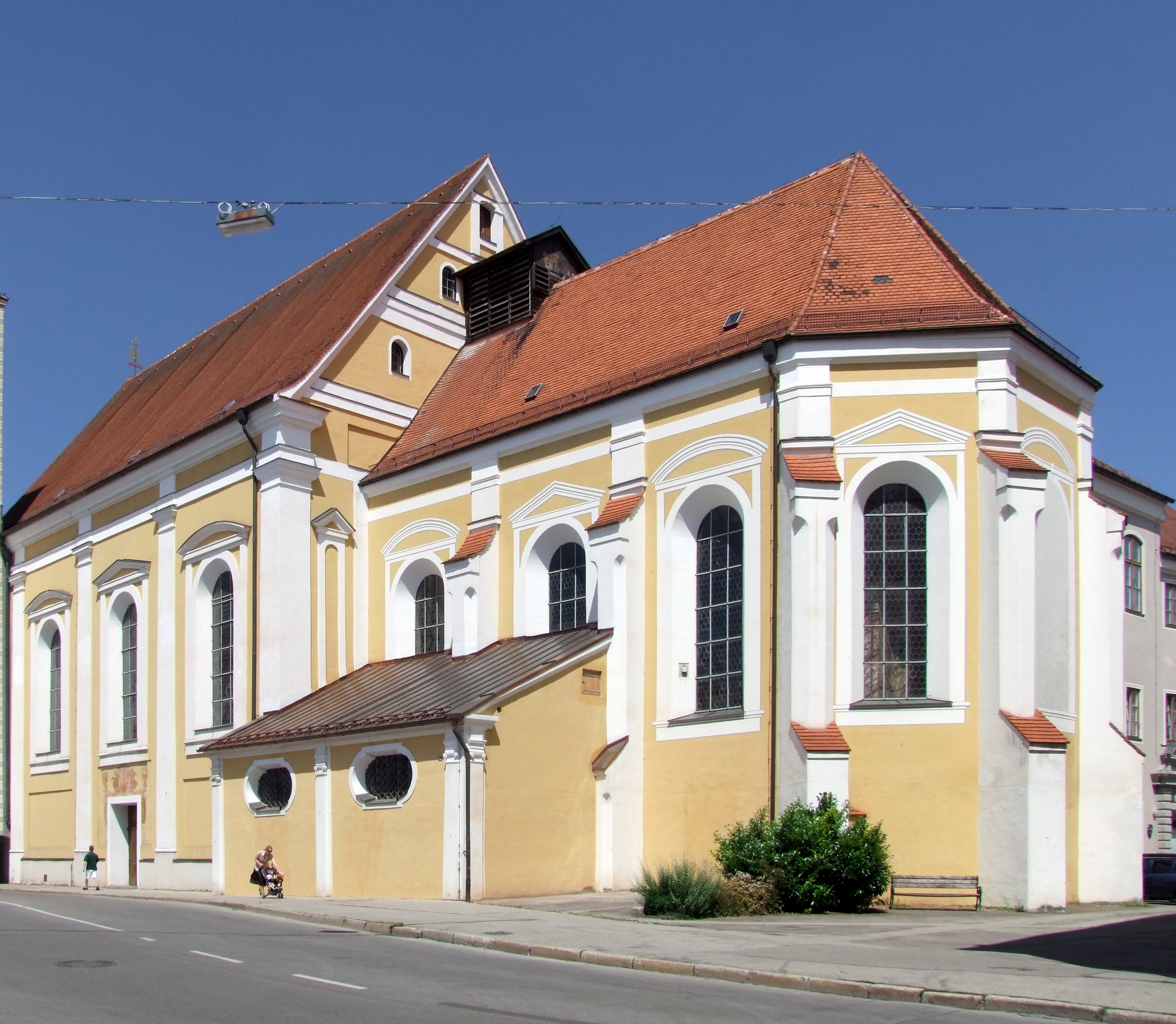 Mariä Verkündigung im oberschwäbischen Mindelheim